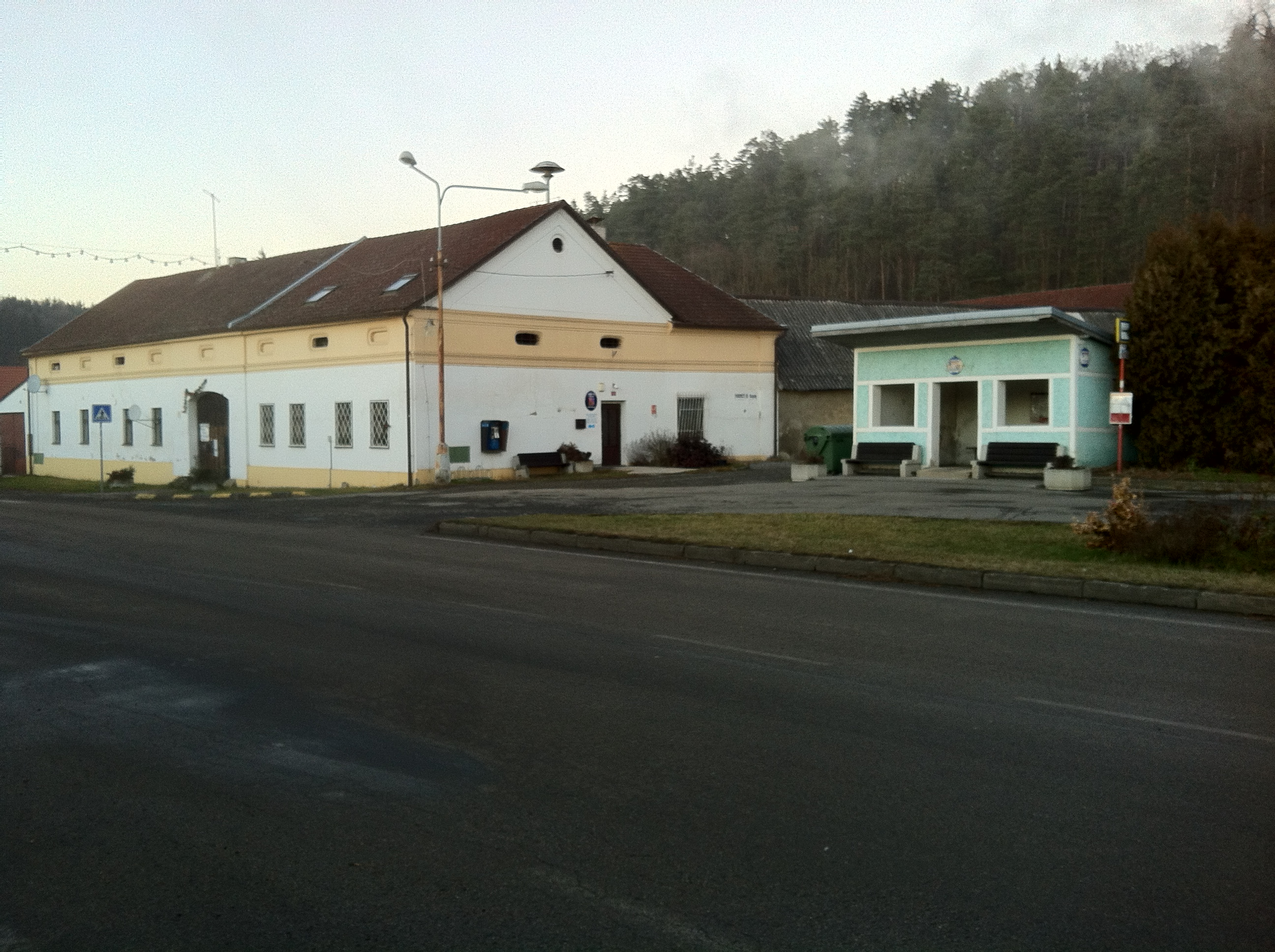 Nespeky, úřad a zastávka autobusu směr Praha.